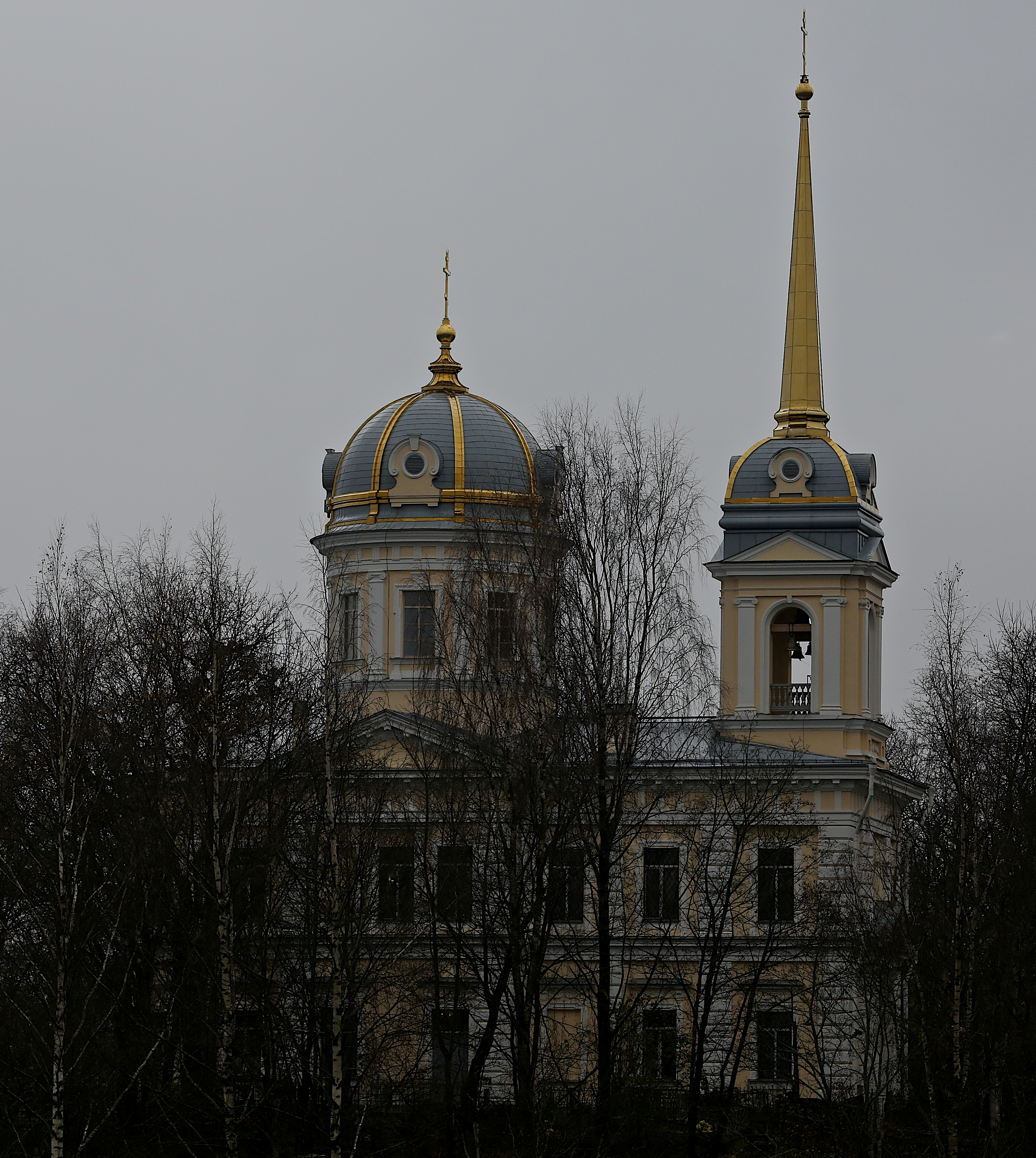 Церковь Рождества Пресвятой Богородицы и святой вмч. Екатерины в пос. Динамо, Павловск